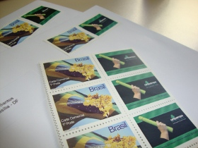 Para celebrar as primeiras formaturas da Universidade Federal do Pampa, um selo comemorativo foi confeccionado pelos Correios e distribuído com os convites.